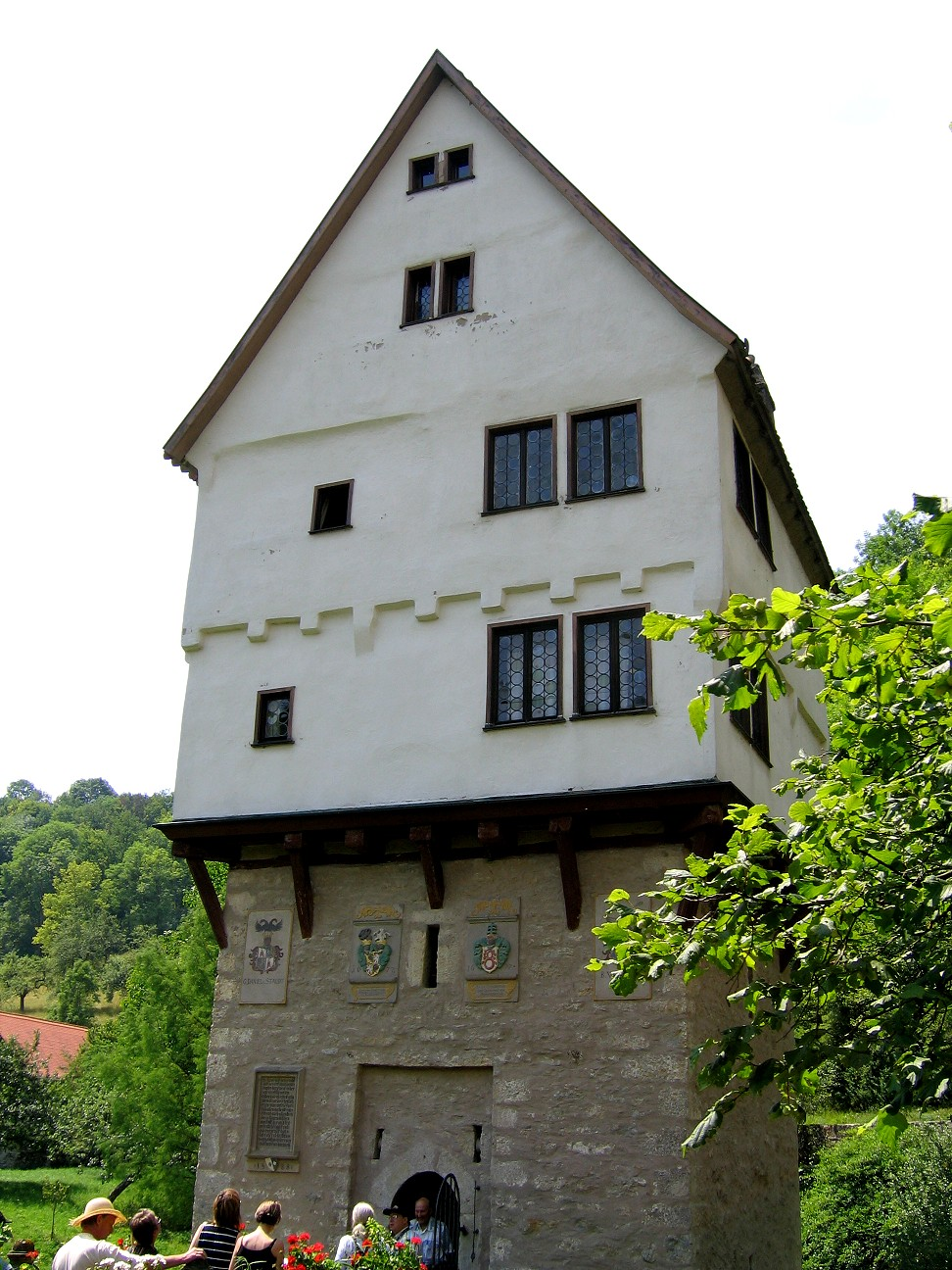 Topplerschlösschen bei Rothenburg ob der Tauber